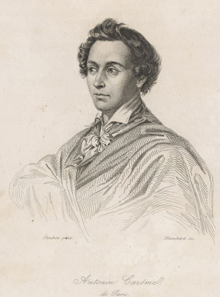 Portrait de Marie-Antoine Carême illustrant sa nécrologie par M. Fayot, dans L'Art culinaire et des repas chez les peuples anciens, page 178. L'article nous dit que Marie-Antoine Carême a travaillé durant 12 ans chez Monsieur de Talleyrand-Perigord.